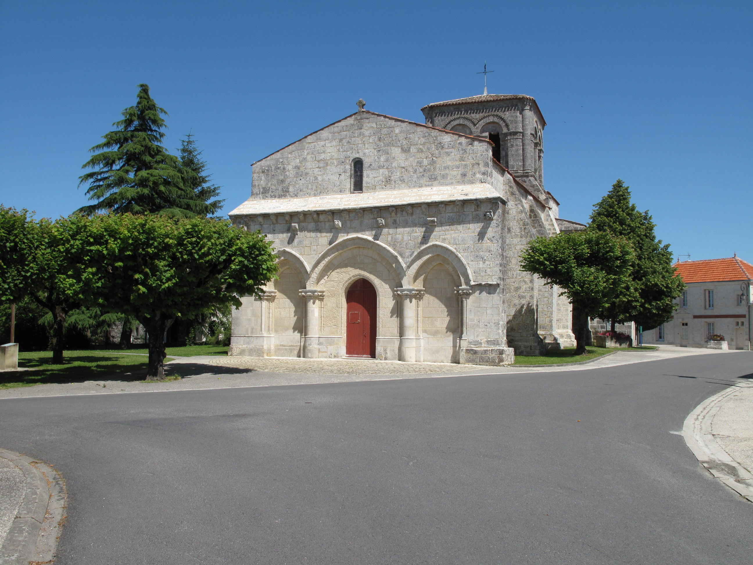 L'Eglise Sainte Eulalie de Préguillac